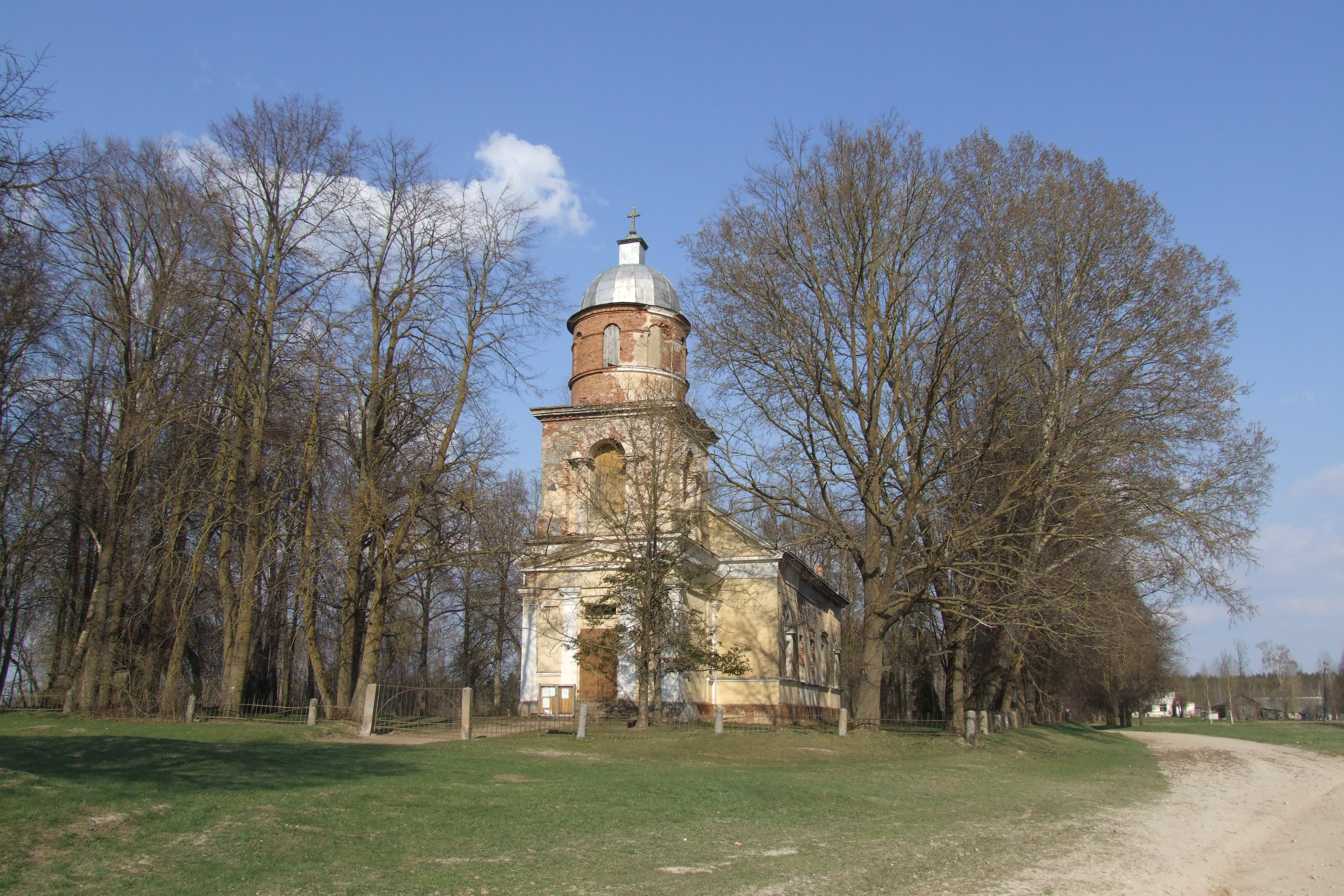 Jaunsaules evaņģēliski luteriskā baznīca, 24.04.2011.